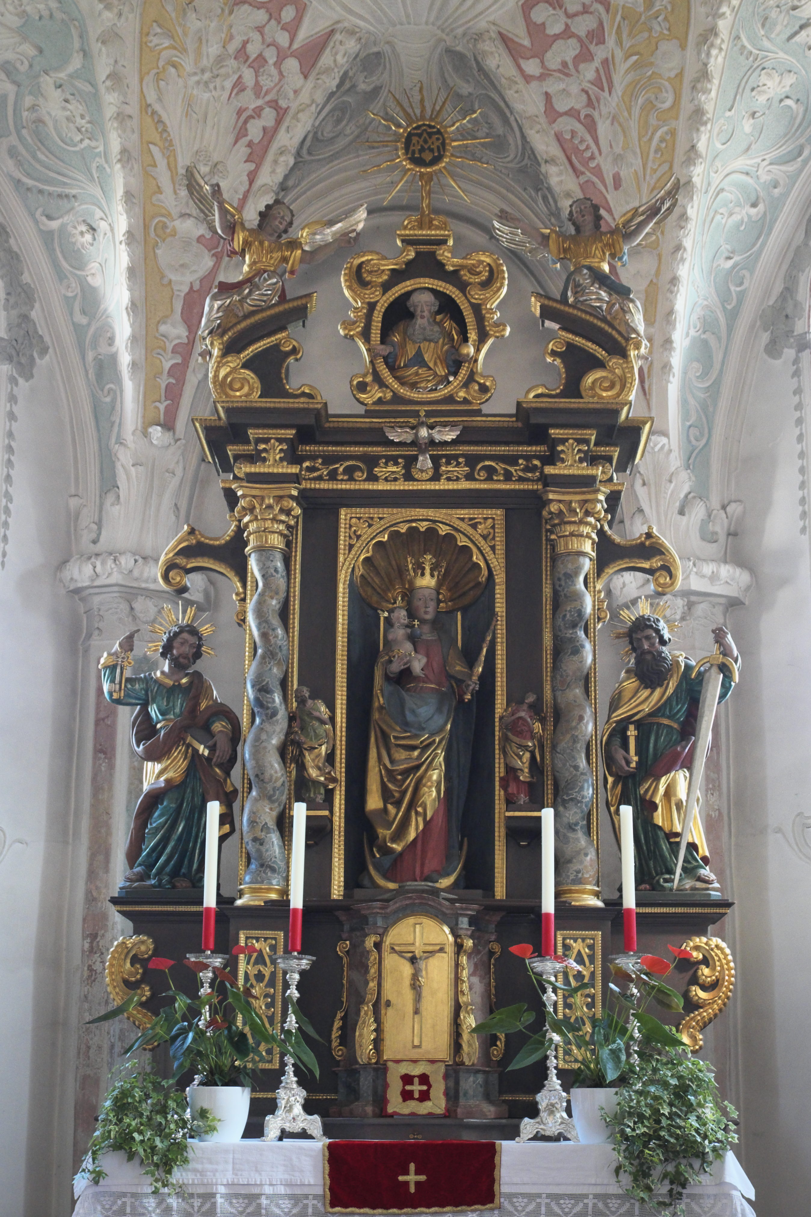 Katholische Filialkirche St. Sebastian in Puch, einem Stadtteil von Fürstenfeldbruck im Landkreis Fürstenfeldbruck (Bayern/Deutschland), Hochaltar von 1867